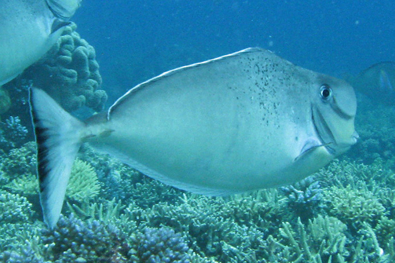 Naso tonganus en Lizard Island, Gran Barrera de Arrecifes